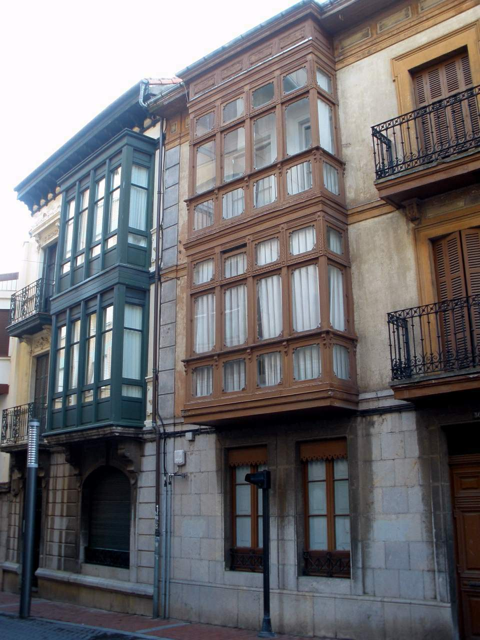 Paisaje urbano de Mundaka (Bizkaia)